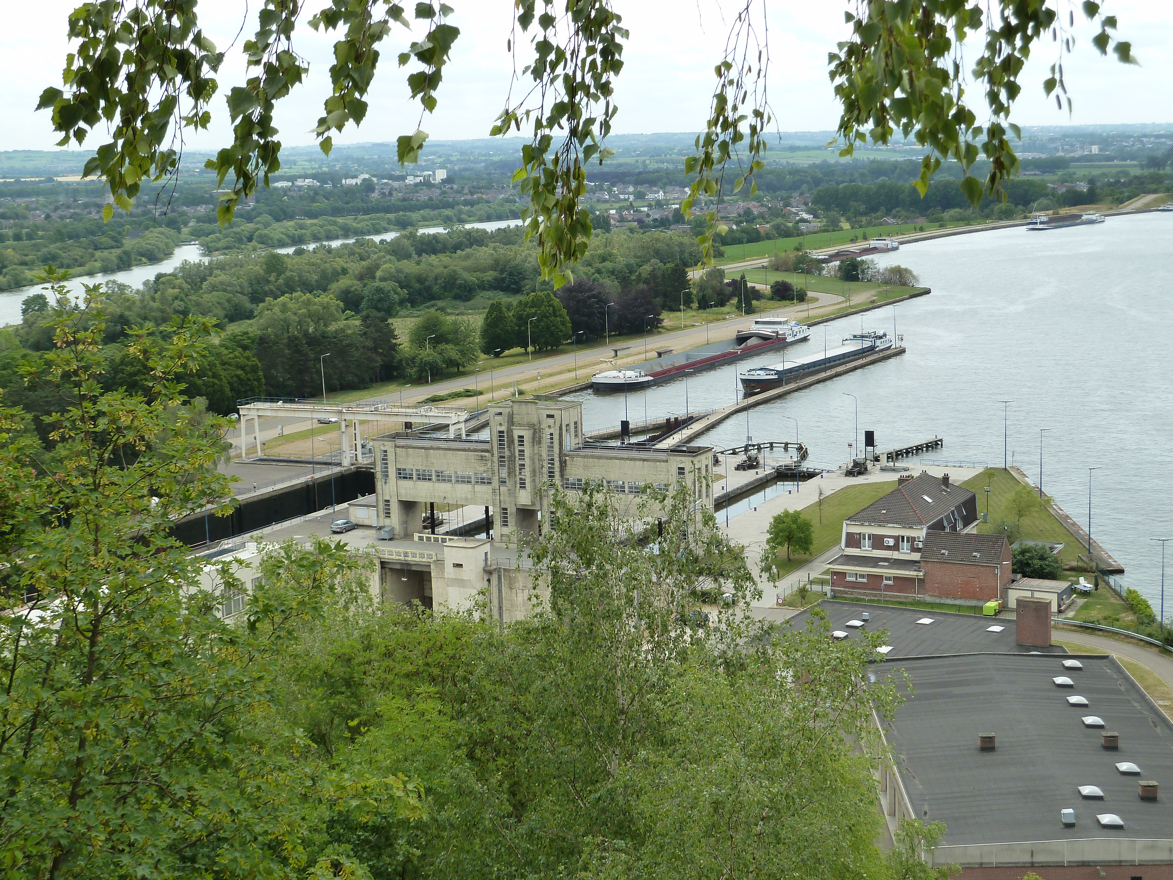 Albertkanaal ter hoogte Plateau van Caestert, België